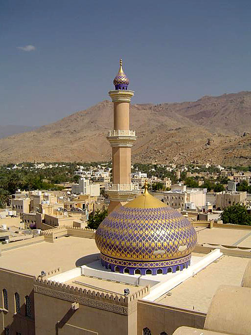 oman_nizwa_moschee.jpg